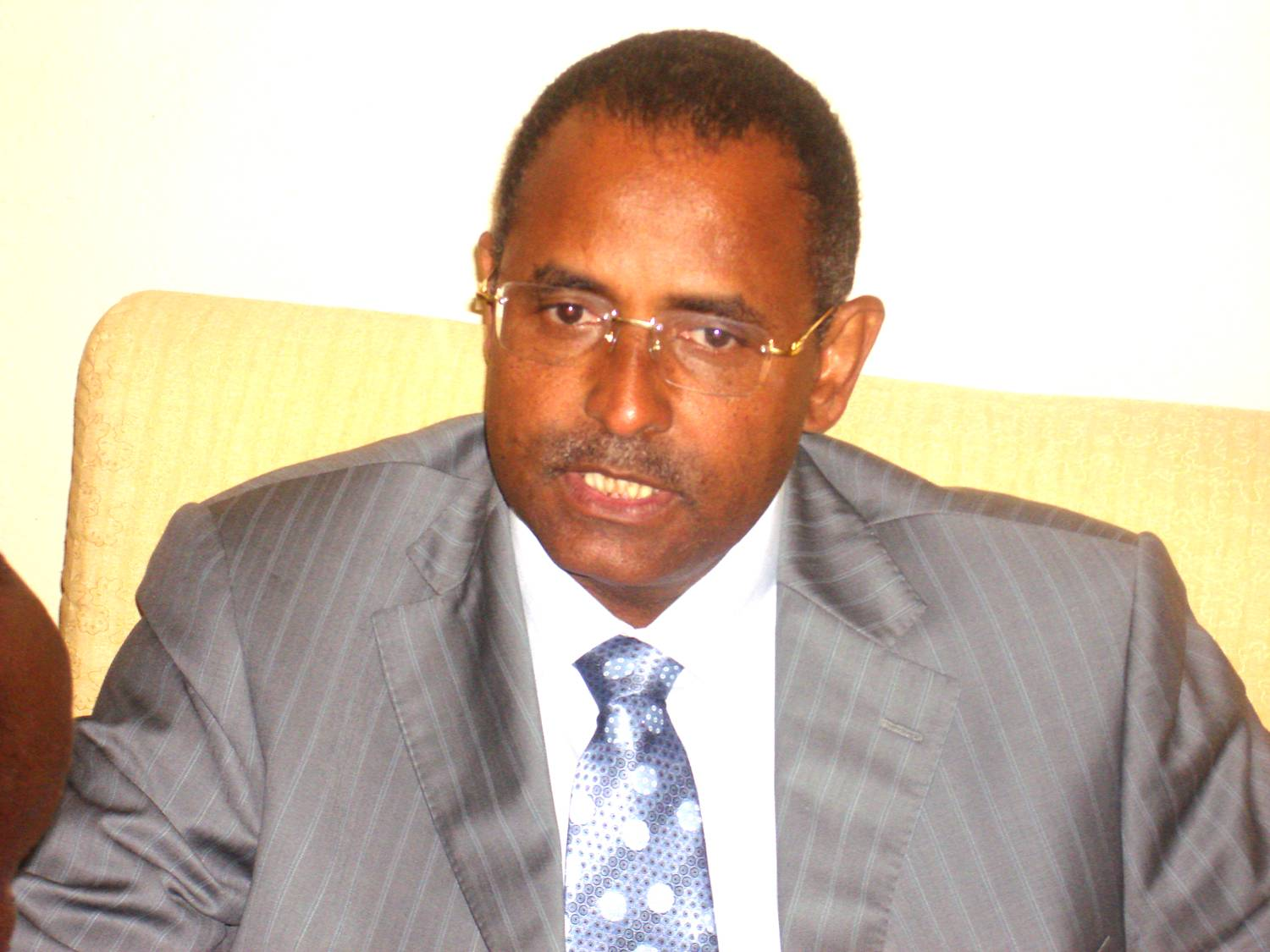 Patrick Achi, Ministre des Infrastructures économiques de Côte d'Ivoire.